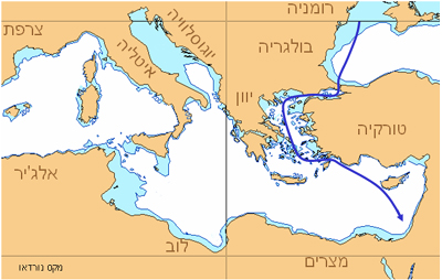 אוניית המעפילים מקס נורדאו - מסלול